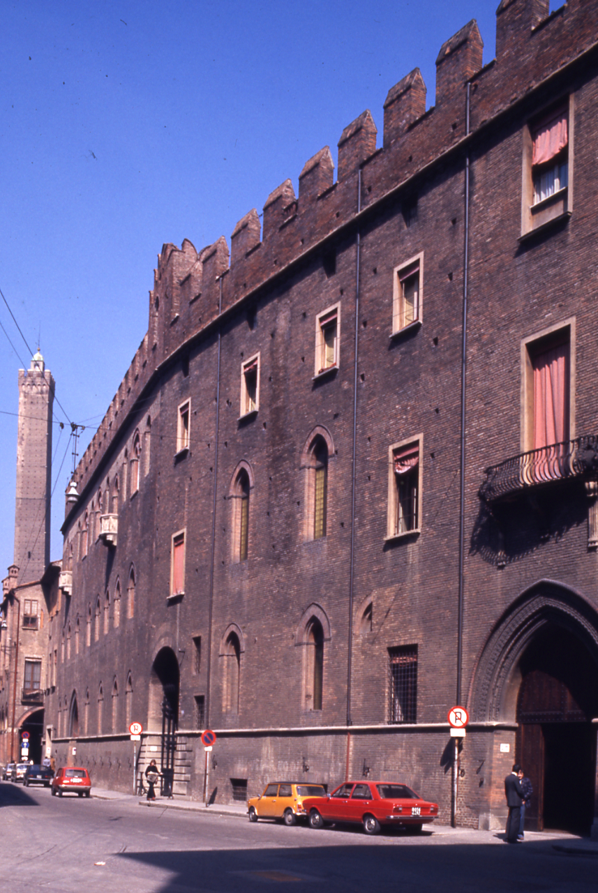 Servizio fotografico : Bologna, 1976 / Paolo Monti. - Foglio: 1, Fotogrammi complessivi: 20/20 : Diapositiva, sviluppo cromogeno/ pellicola ; 35 mm. - ((Sullo chassis della diapositiva n. 01 iscrizione manoscritta "Bo". - Nel contenitore 316/330D tra i fogli in pvc contenenti le diapositive ritaglio di stampa fotografica con al verso iscrizione manoscritta: "Bologna/ Part. Palaz Chiese per volum. picc. Renzi". - Confronti con negativi (gelatina bromuro d'argento/ pellicola - 35mm). - . - Occasione: Documentazione per la pubblicazione: Renzi Renzo, "Storia dei luoghi della città di Bologna", Bologna, E.P.T., 1976. - Fonte: Rubrica di Paolo Monti: Diapositive 24x36mm (1948-1982), presso Archivio Paolo Monti. Rubrica con elenco soggetti e numeri di inventario (da 1 a 1000) corrispondenti ai fogli a tasche in pvc in cui sono contenute le diapositive. - Fonte: Monografia di Renzi, Renzo: Storia dei luoghi della città di Bologna, Bologna, E.P.T. (1976). - Fonte: Agenda di Paolo Monti: Monti - Agenda 1976 (1976/00/00), presso Archivio Paolo Monti. - Fonte: Fattura di Paolo Monti: IV. Commesse/ Fattura n. 09/ Fotografie monumenti artistici Emilia-Romagna (1976/07/05), presso Archivio Paolo Monti